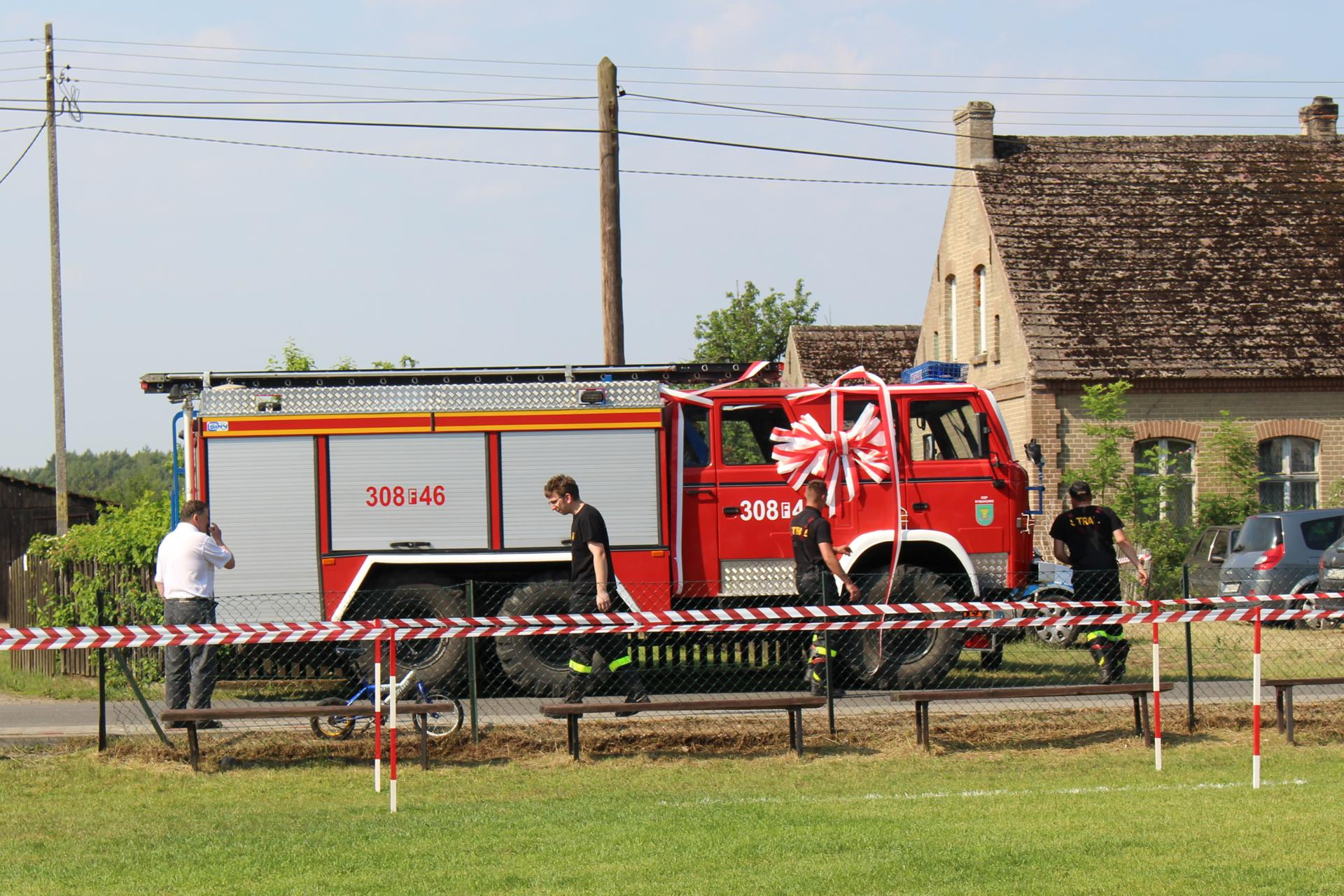 OSP Rybakowo